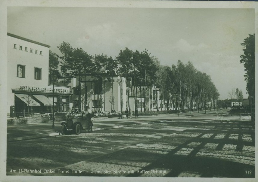 Onkel Toms Hütte in Berlin; Blick vom östlichen Vorplatz des U-Bahnhofs Onkel Toms Hütte in südöstliche Richtung entlang der Riemeisterstraße. Zu sehen sind u.a. das Café Brumm (heute Der Kretaner) und auf dem Gehweg die Schatten der Baustelle des U-Bahnhofs. Der Gehweg wurde später zugunsten einer breiteren Straße bis zu den Bäumen zurückgebaut.